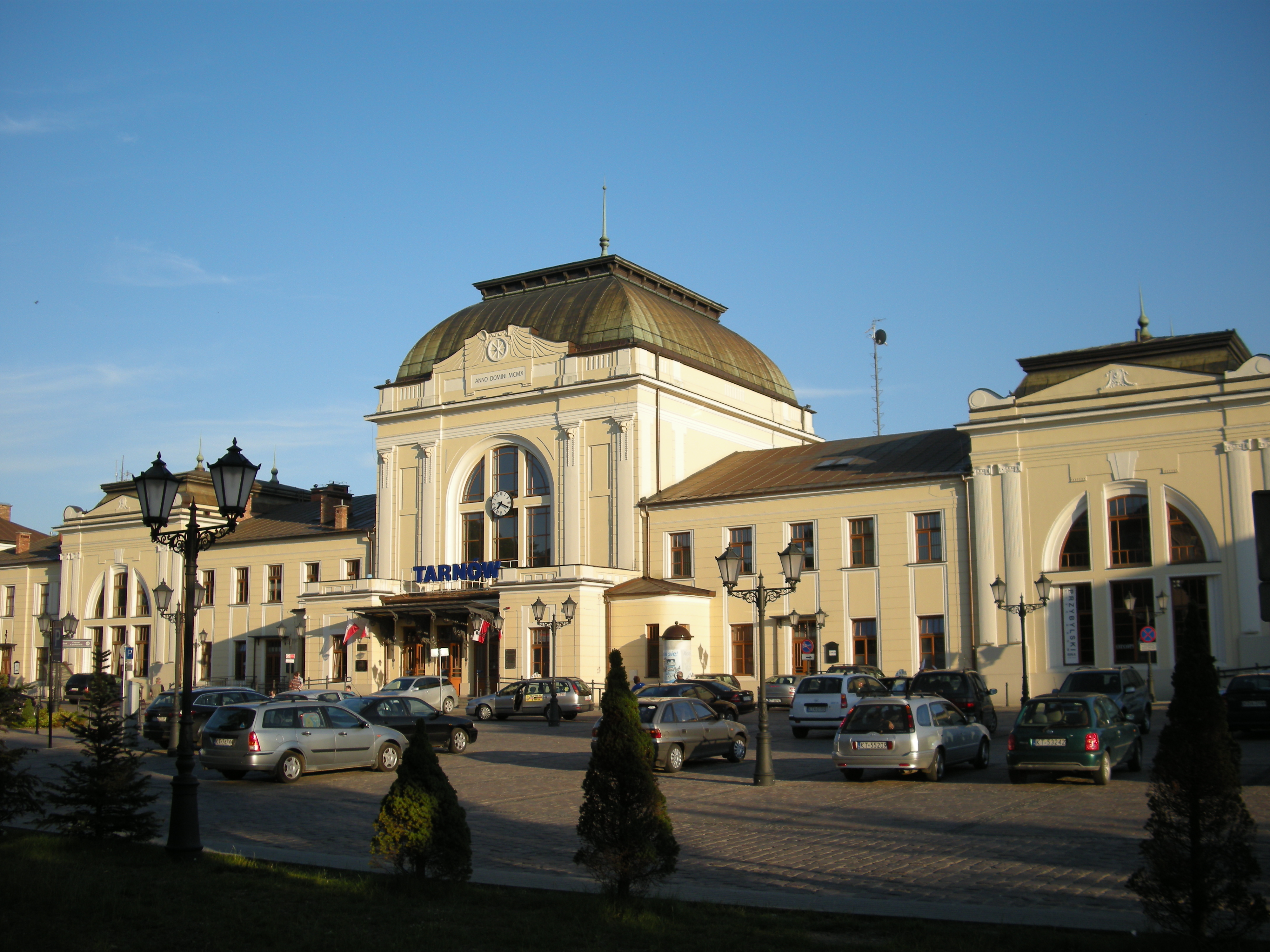 Dworzec kolejowy